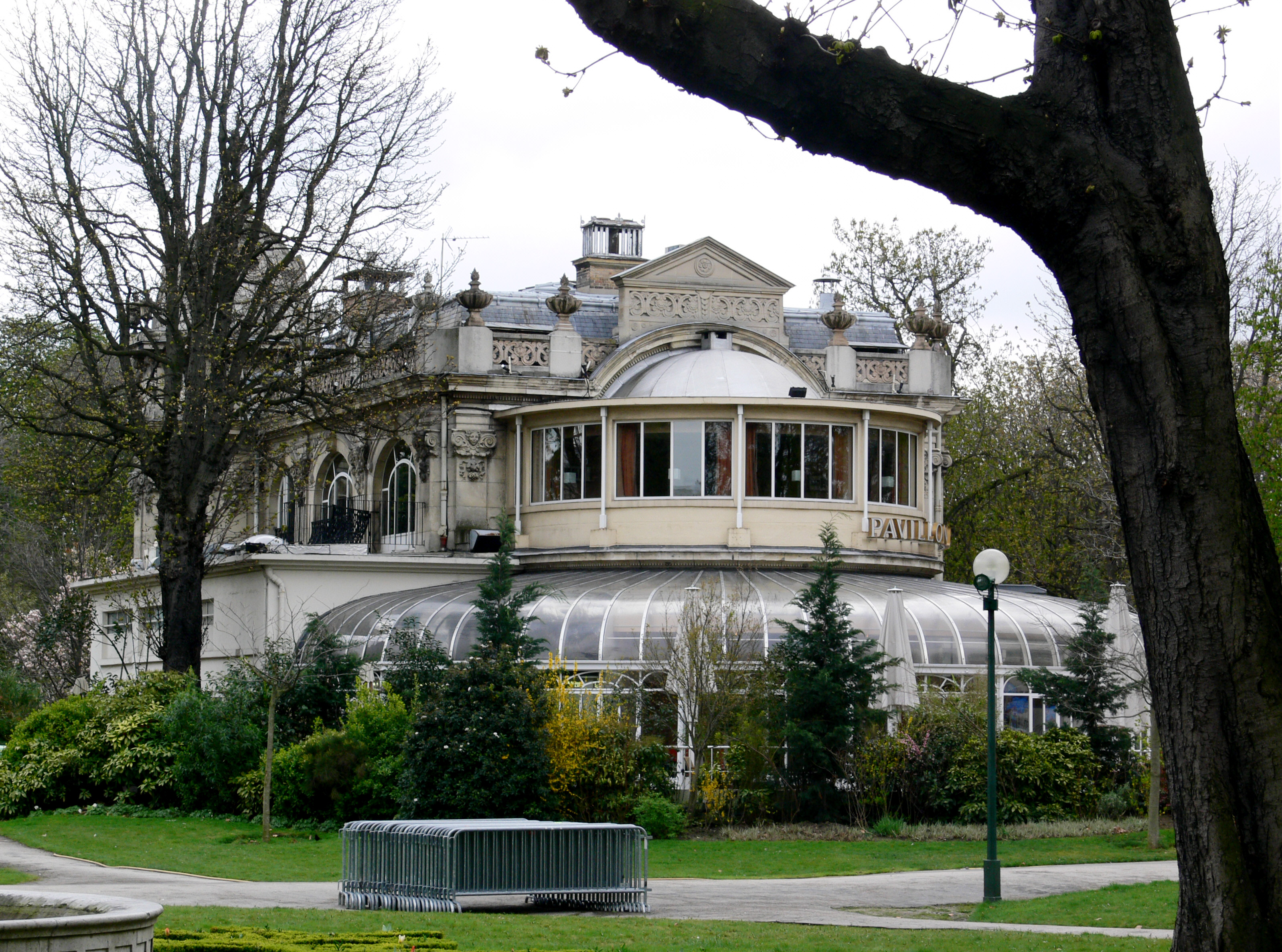 Restaurant „Pavillon Élysées“; 10, avenue des Champs-Élysées (allée Marcel Proust), Paris